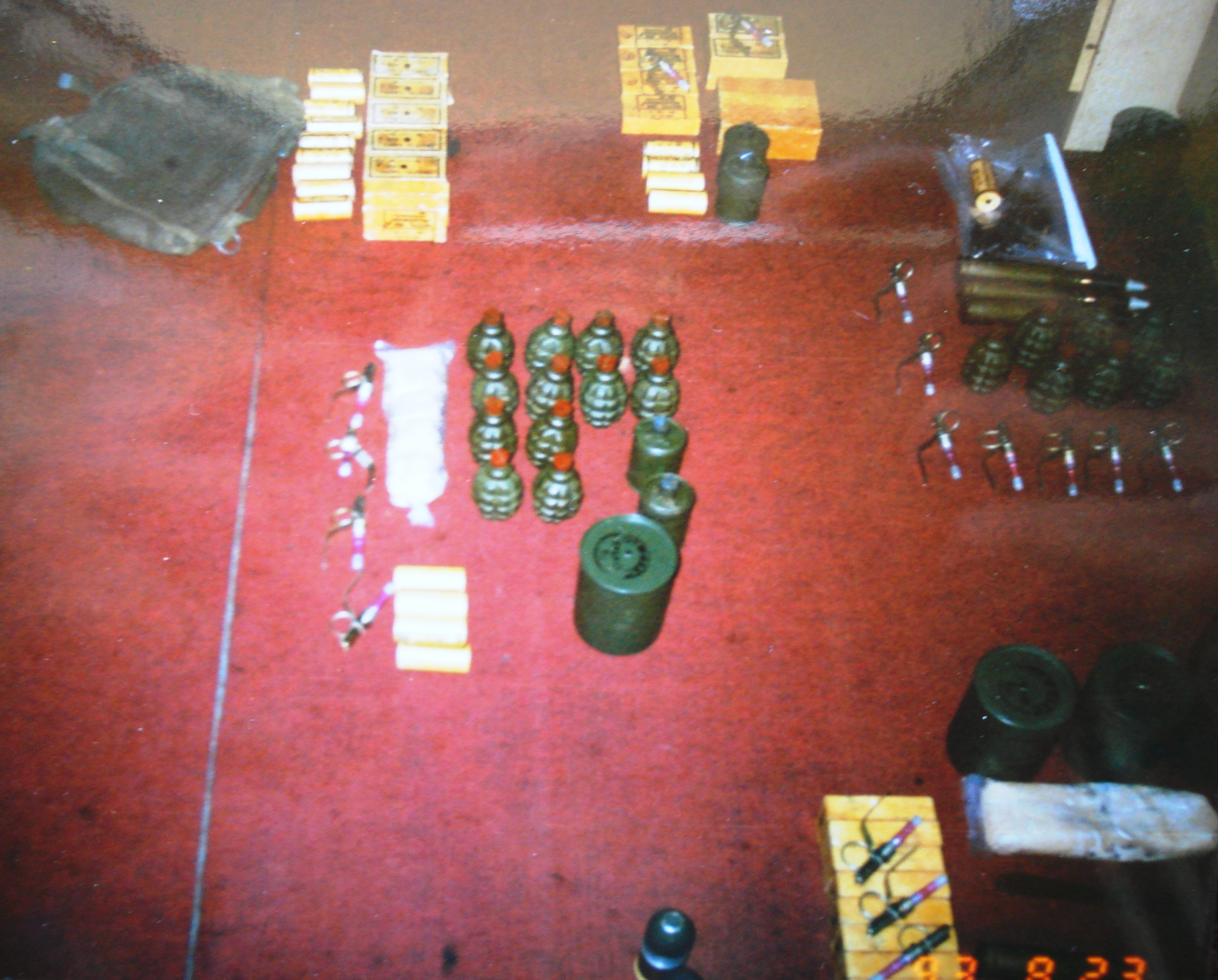 Część z odzyskanych w sierpniu 1993 r. przez Wydział Żandarmerii Wojskowej środków walki.